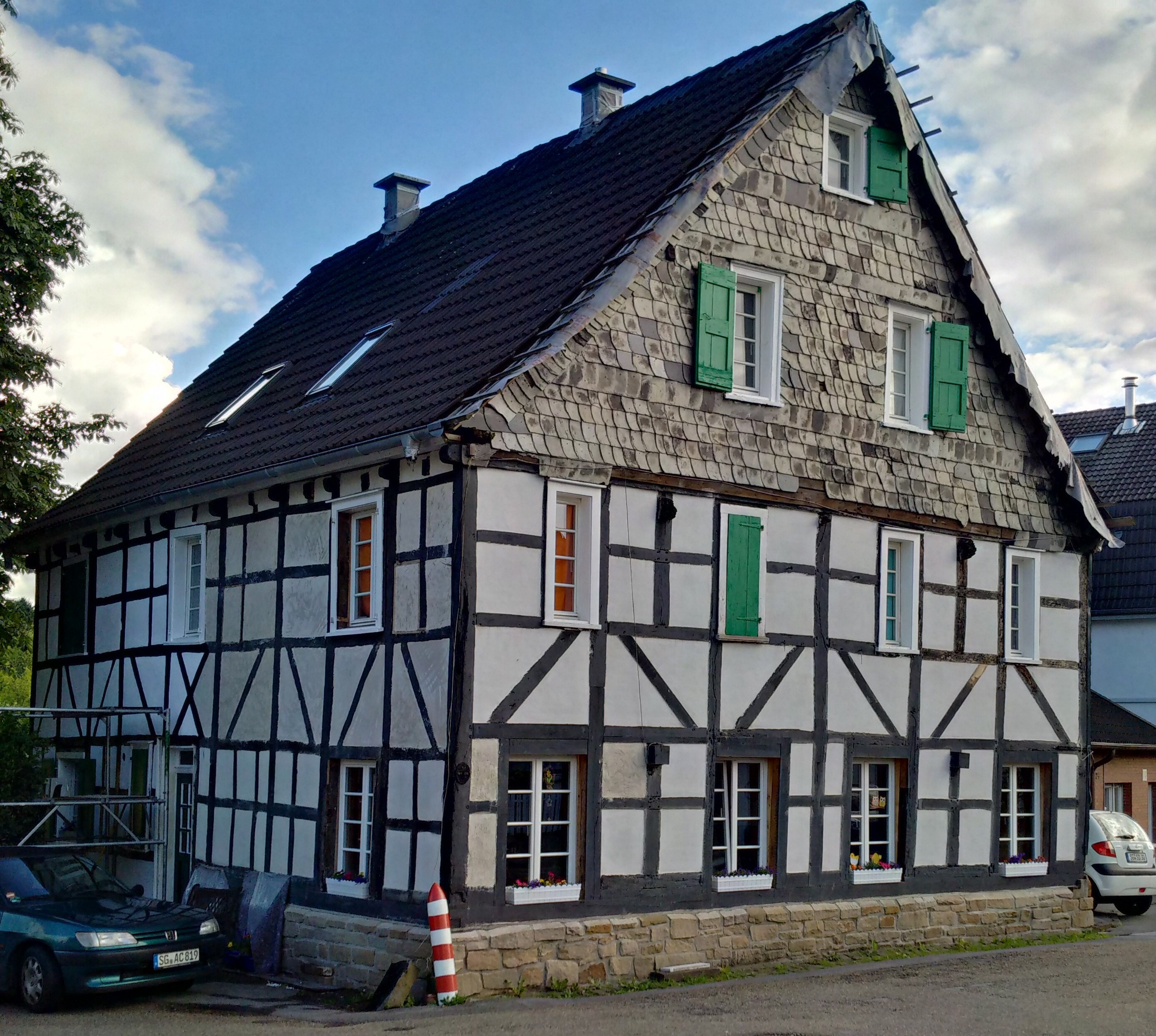 Baudenkmal Gartenstraße 19 in Solingen, aufgenommen im Sommer 2016